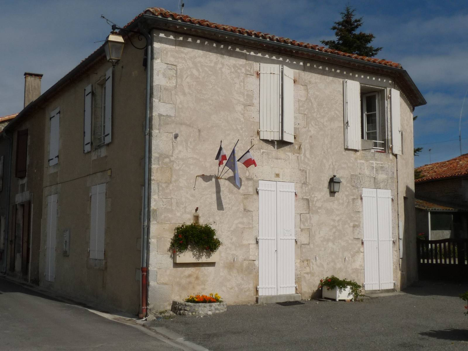 mairie de St-Laurent-de-Belzagot, Charente, France